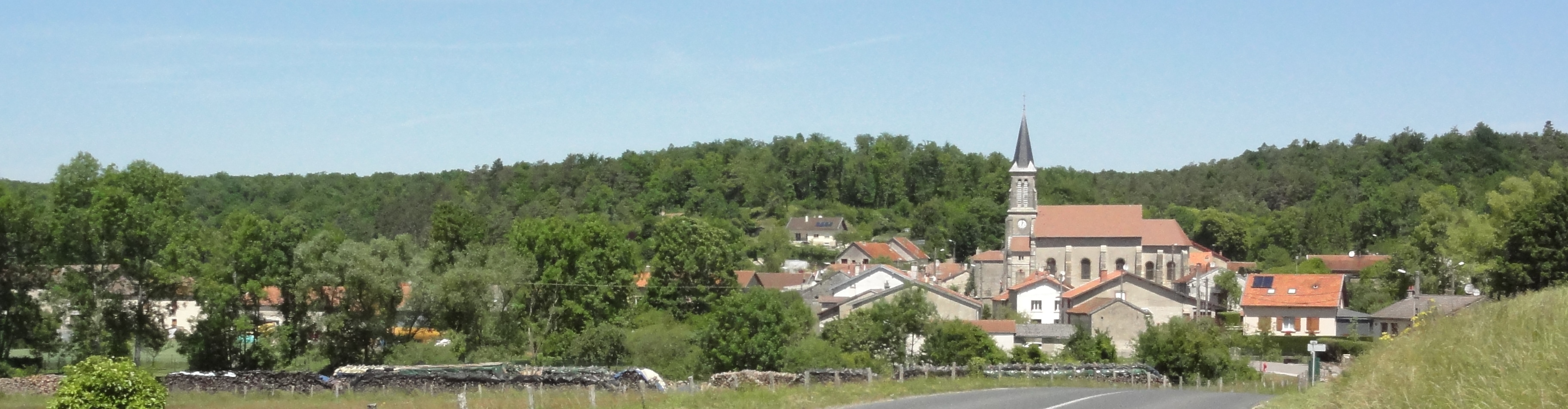 Saucourt-sur-Rognon, vue panoramique village et forêt